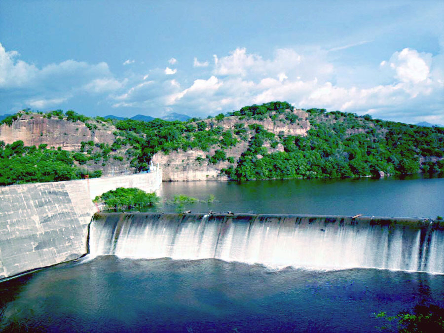 Imagen de La presa de elcajon de onama Ubicada en Guisamopa municipio de sahuaripa en Sonora Mexico.